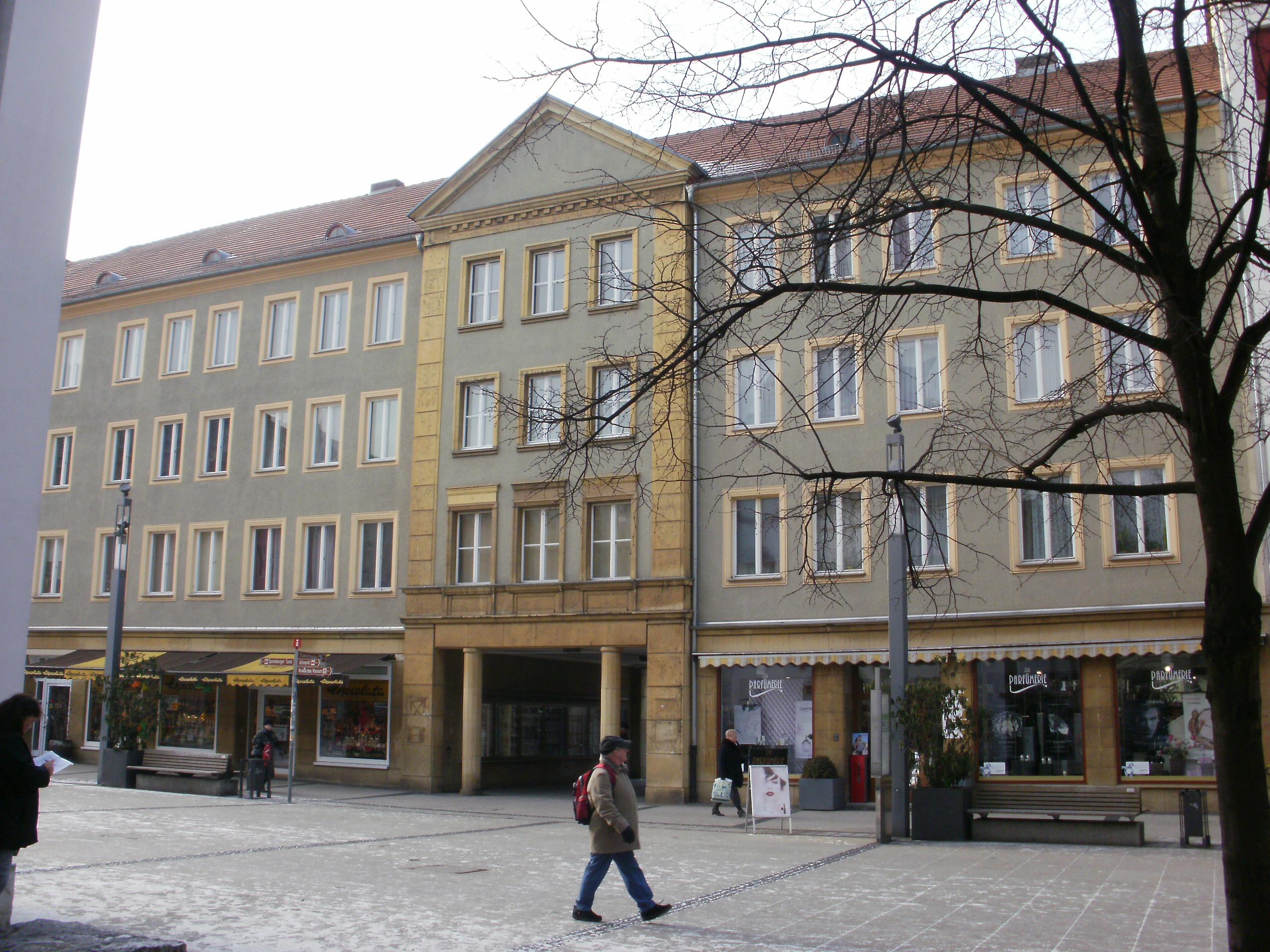 Wohnblock mit Ladengeschoss, Spremberger Straße 32/34, Cottbus